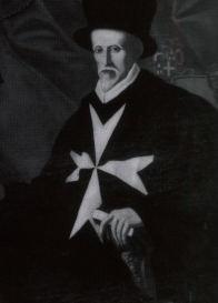 Juan de Homedes, 47. GroÃŸmeister des SMOM